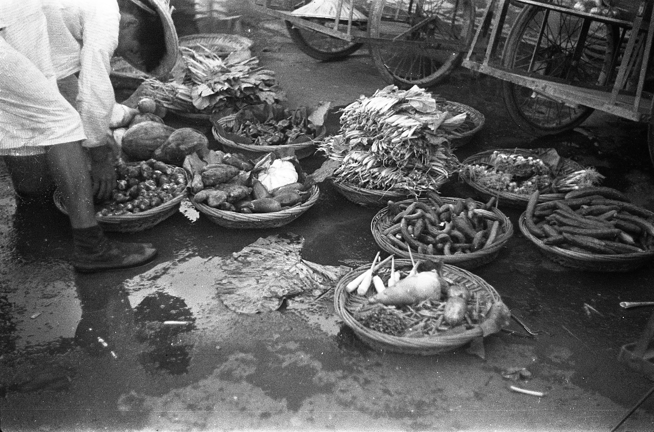 在某果菜市場，臺北。